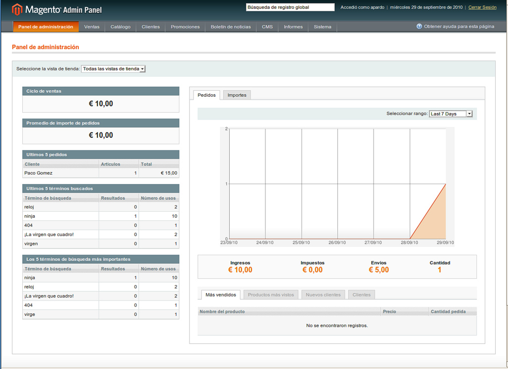 Magento Admin